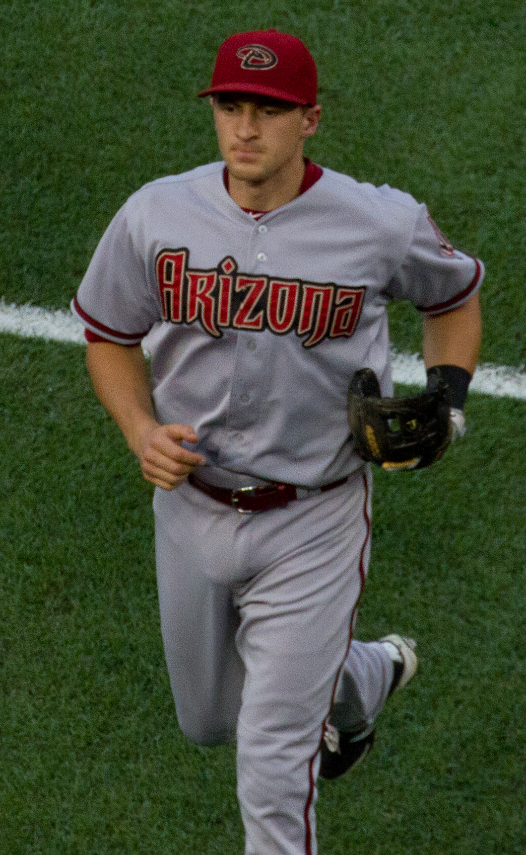 Nick Ahmed